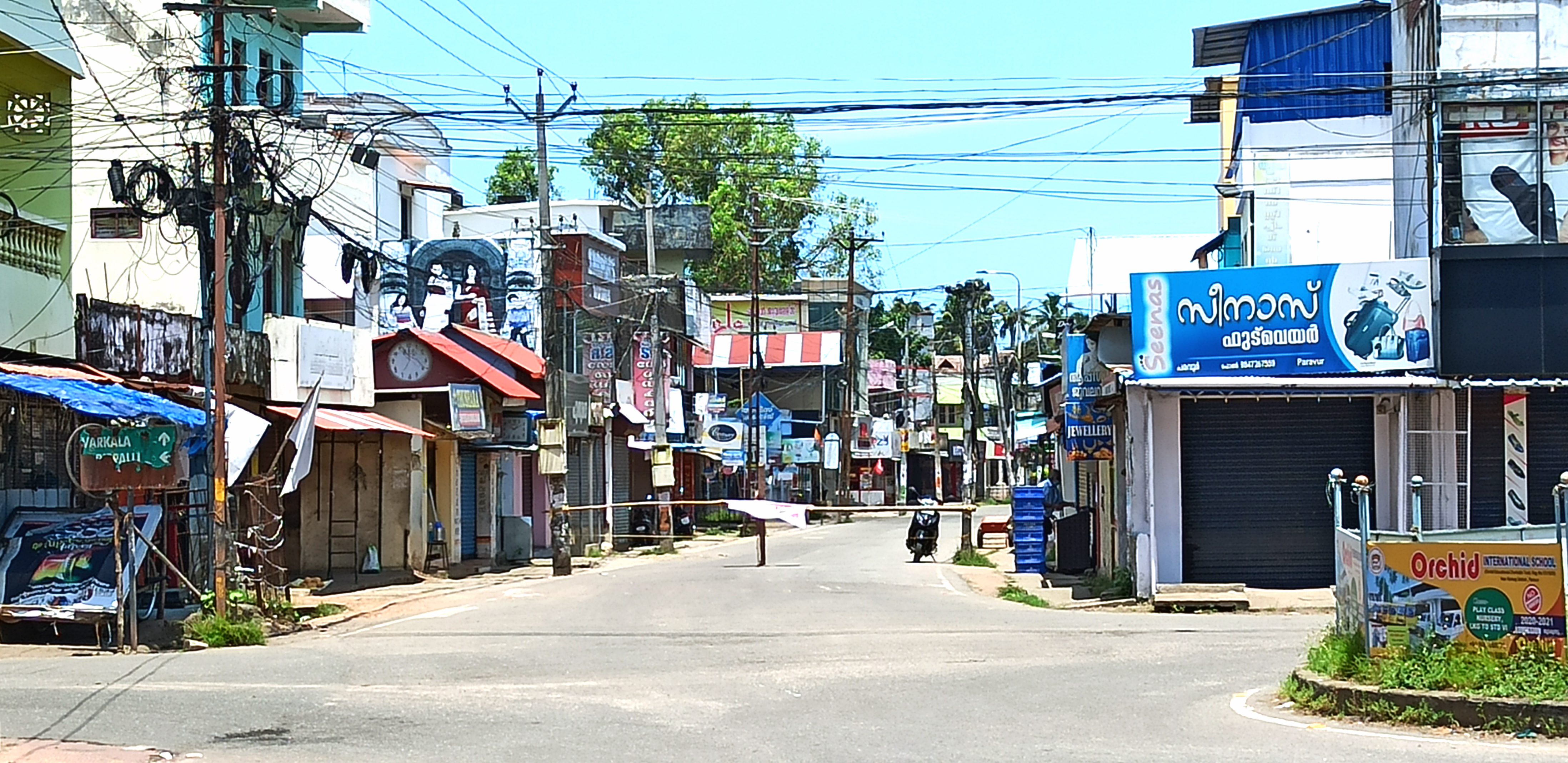 കൊറോണാ വ്യാപനത്തെ തുടർന്ന് അടച്ചിട്ടിരിക്കുന്ന കൊല്ലം മെട്രോപൊളീറ്റൻ ഏരിയയിലെ പരവൂർ-വർക്കല റോഡ്.